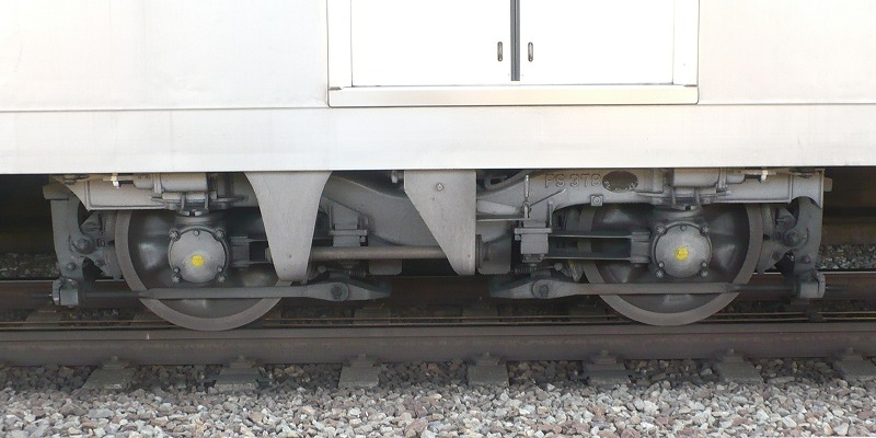 地下鉄6000系台車